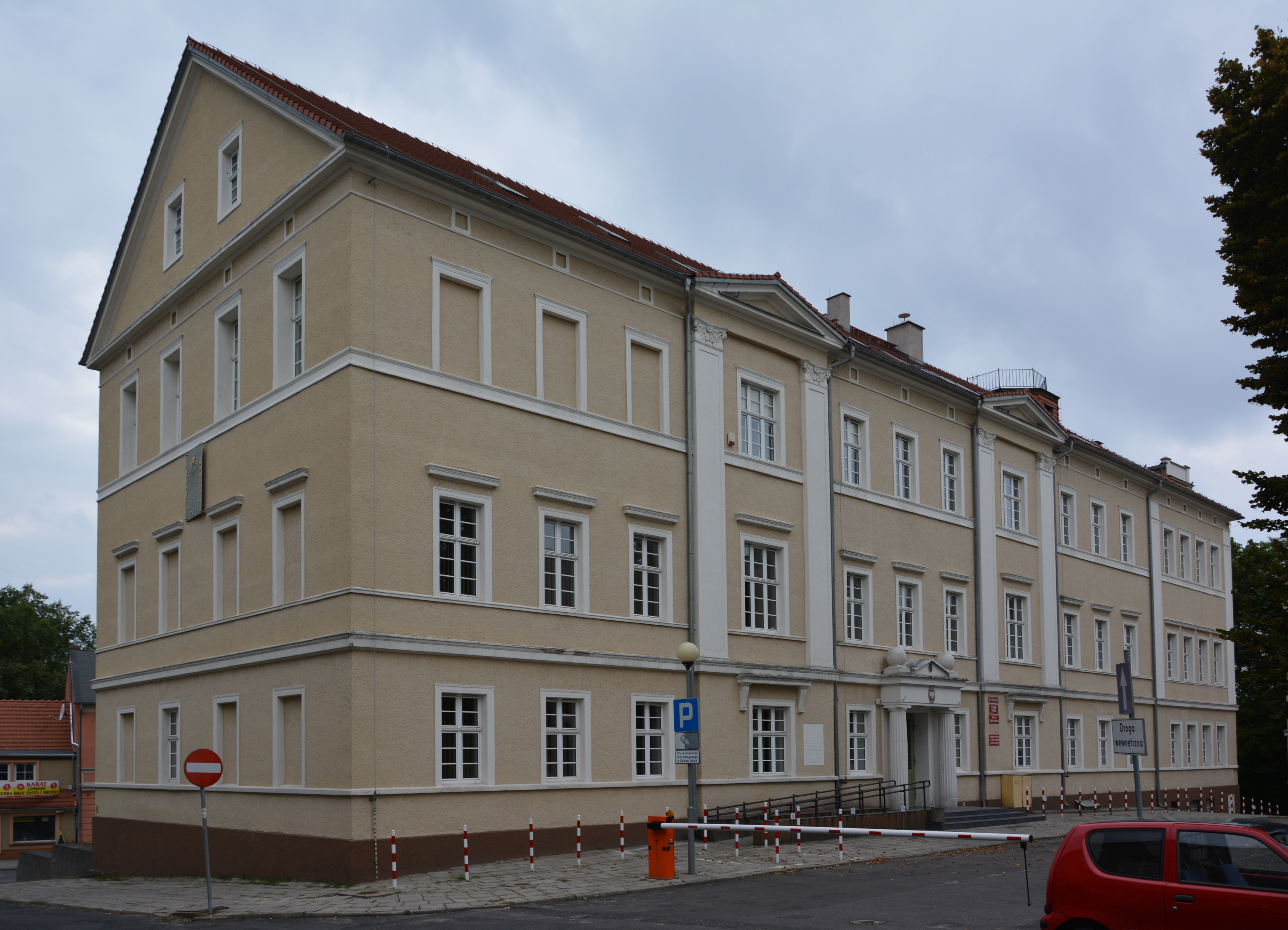 Zielona Góra, gimnazjum im. Fryderyka Wilhelma IV, ob. Sąd Okręgowy, 1846, 1 ćw. XX